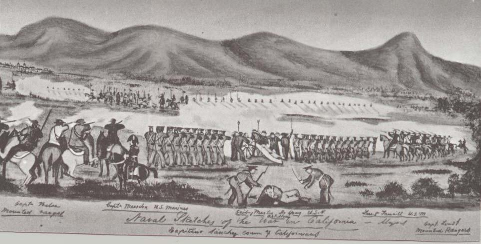 Dibujo de la batalla de Santa Clara. Los soldados estadounidenses son por un momento rechazados por las fuerzas rebeldes mexicanas.